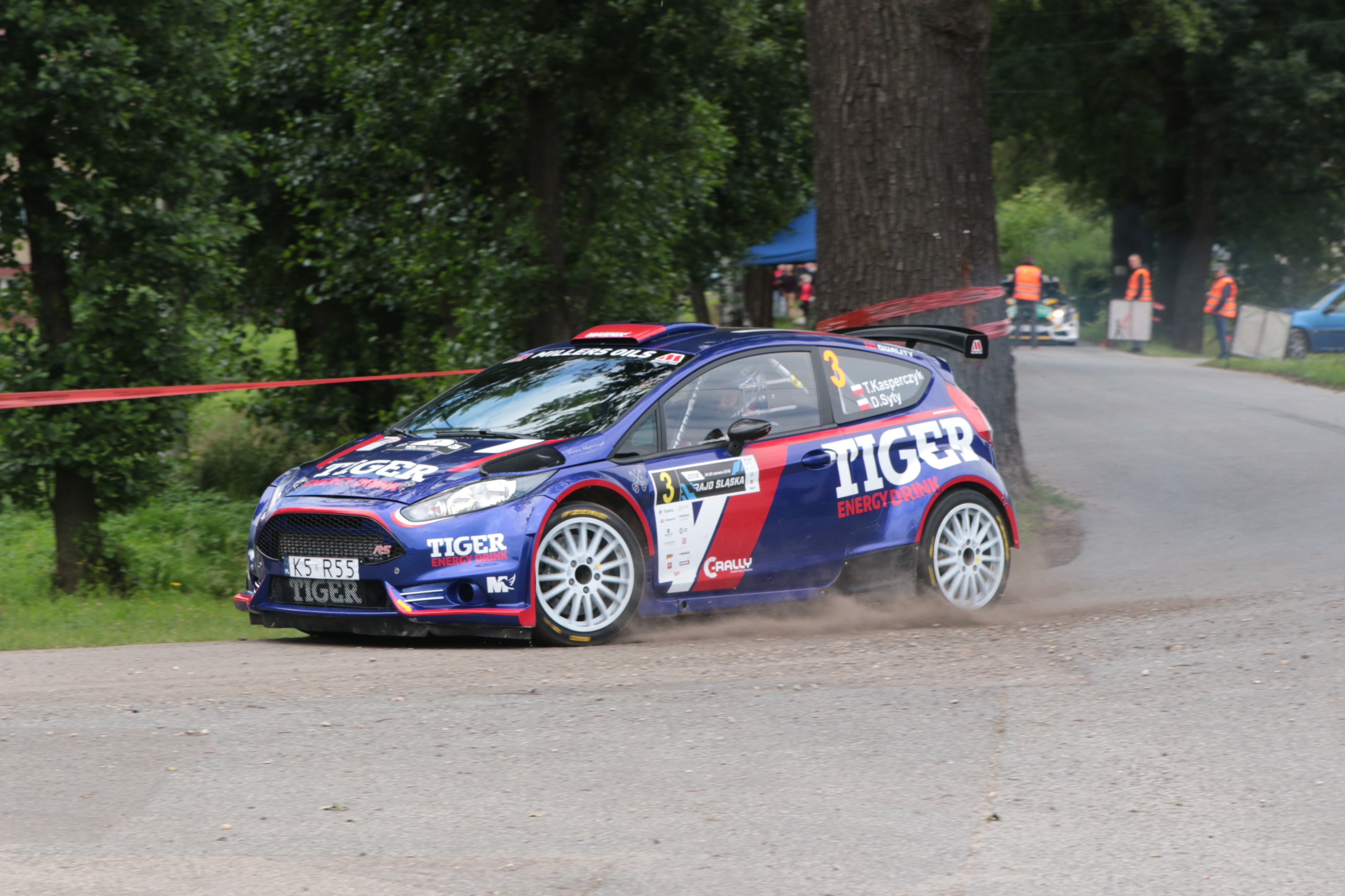 Tomasz Kasperczyk podczas Rajdu Śląska 2018, 7 OS